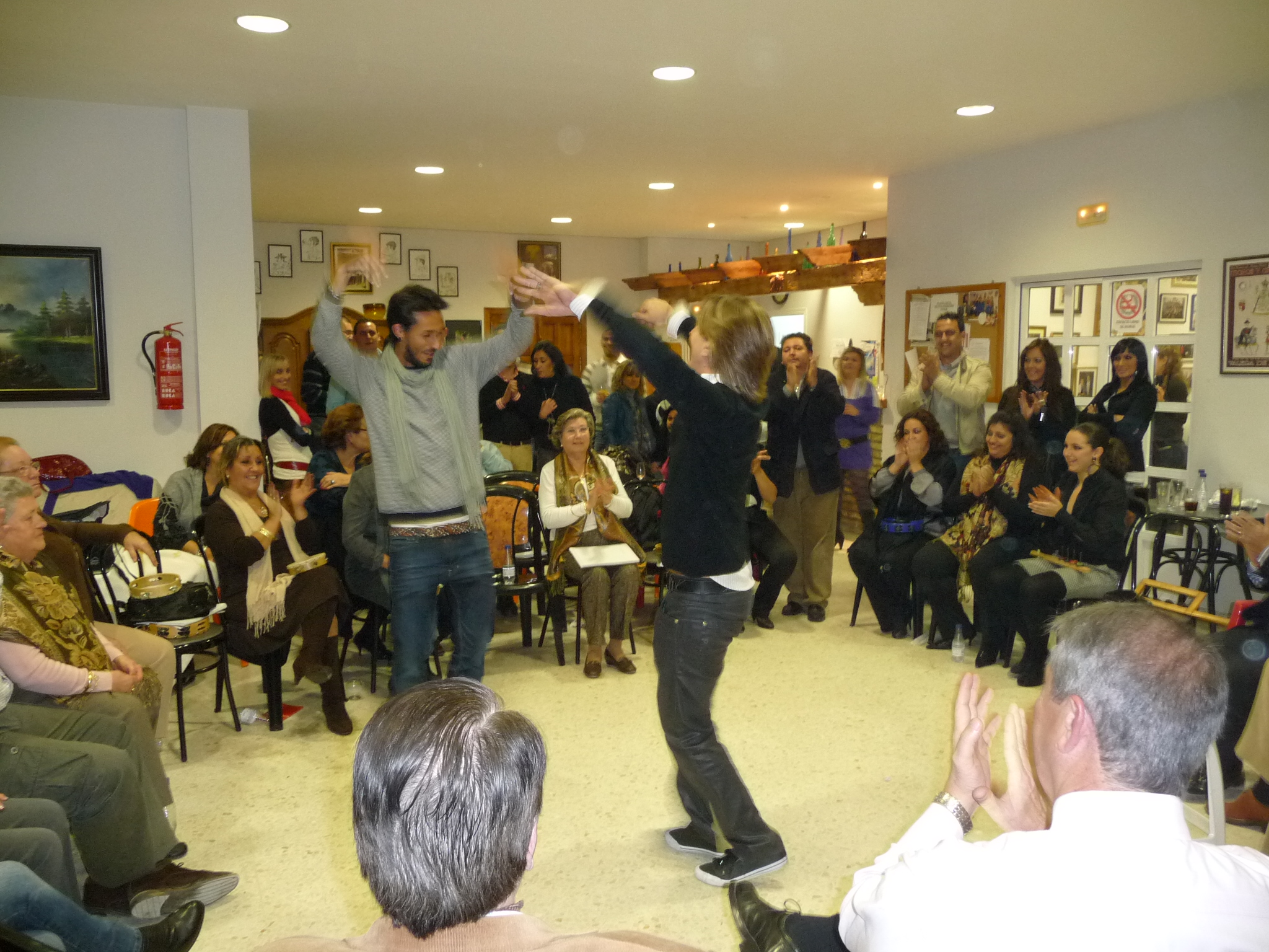 JerezDeLaFrontera-P1050762.JPG